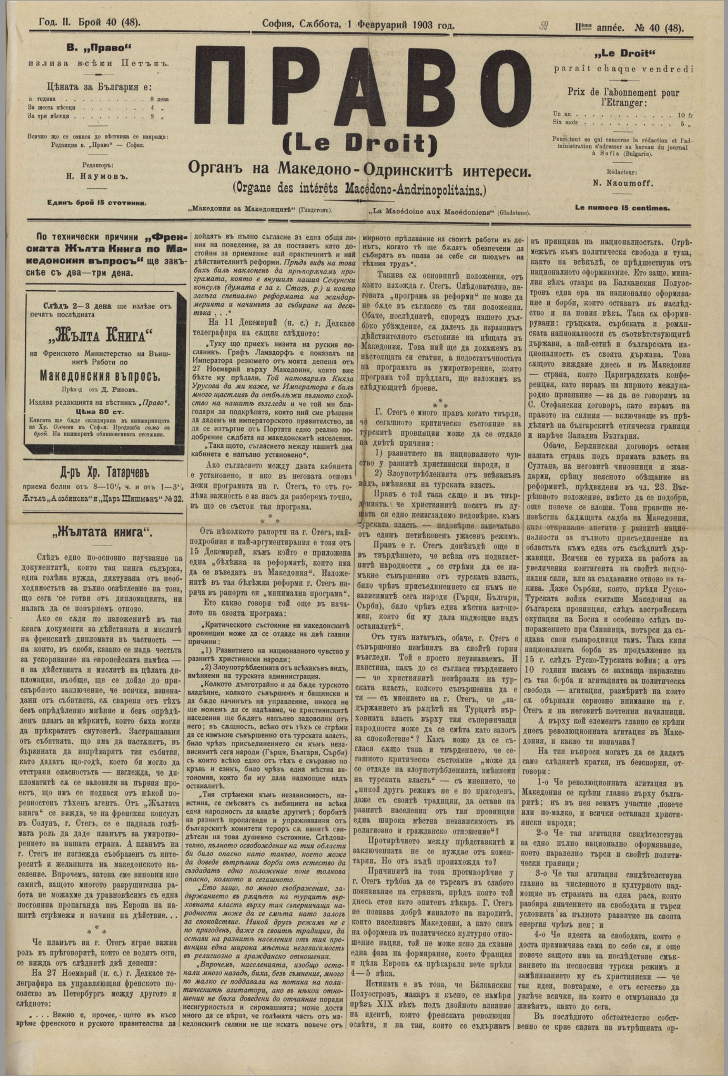 Вестник „Право“, бр. 40 от 1 февруари 1903 г., първа страница